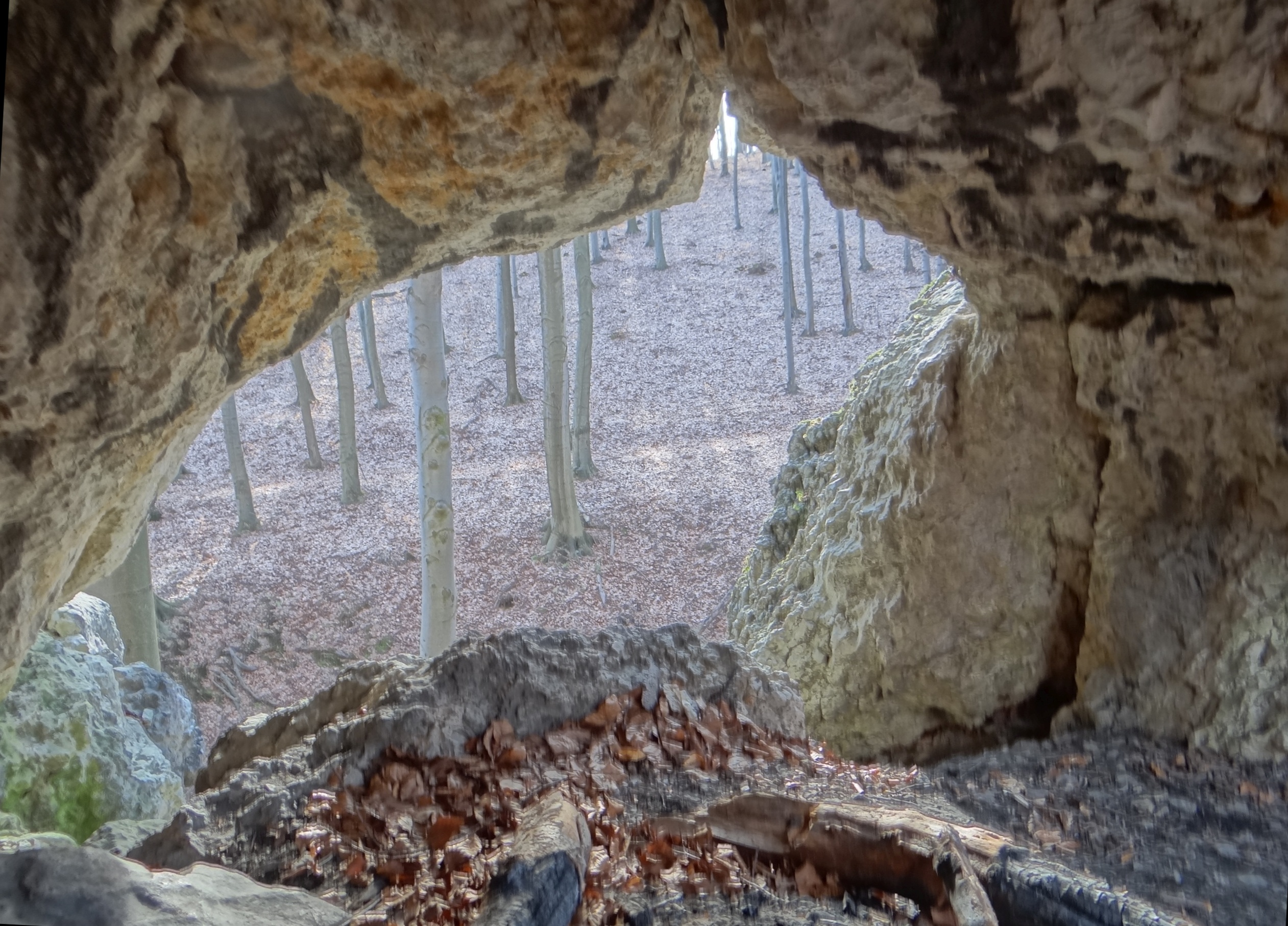 Schronisko Żarskie I w Dolinie Racławki